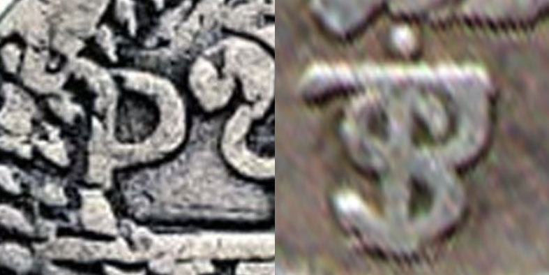 Marcas utilizadas en la Ceca de Potos̪í